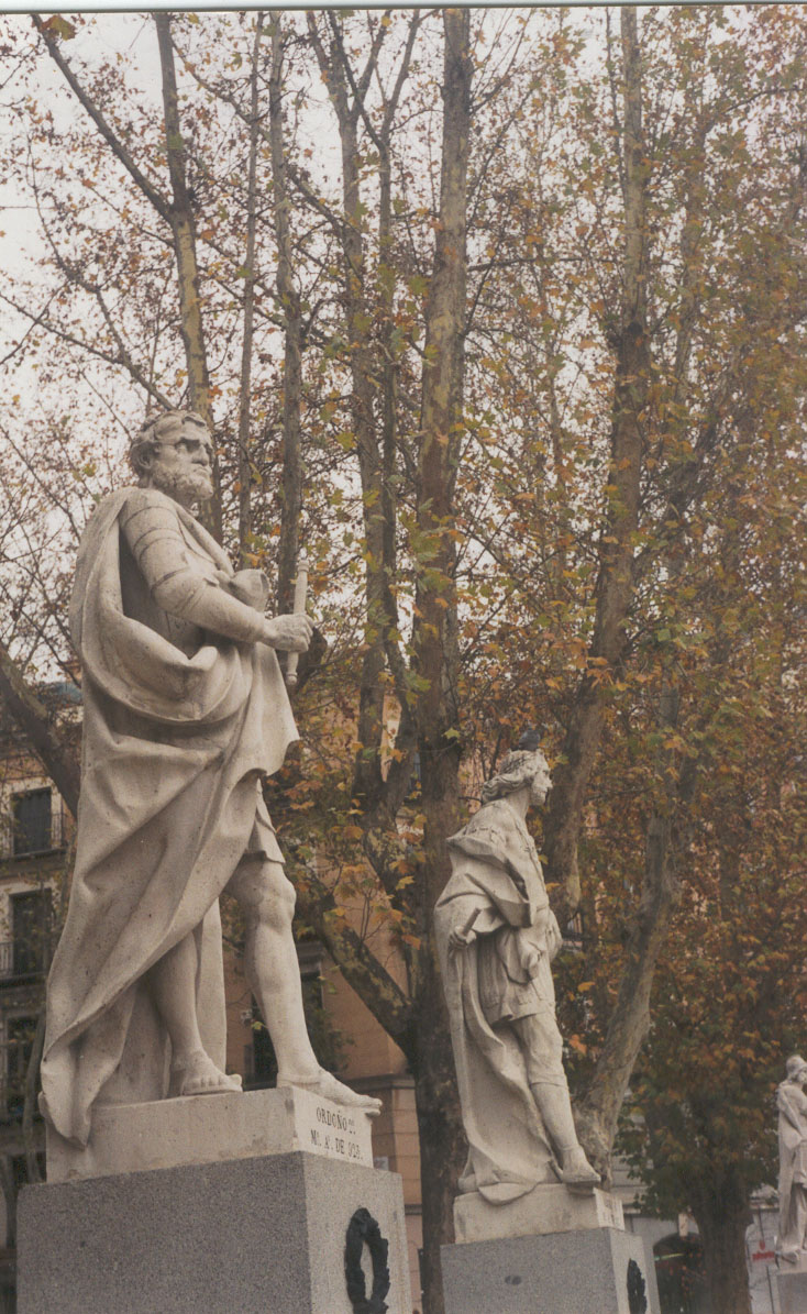 Reyes de España